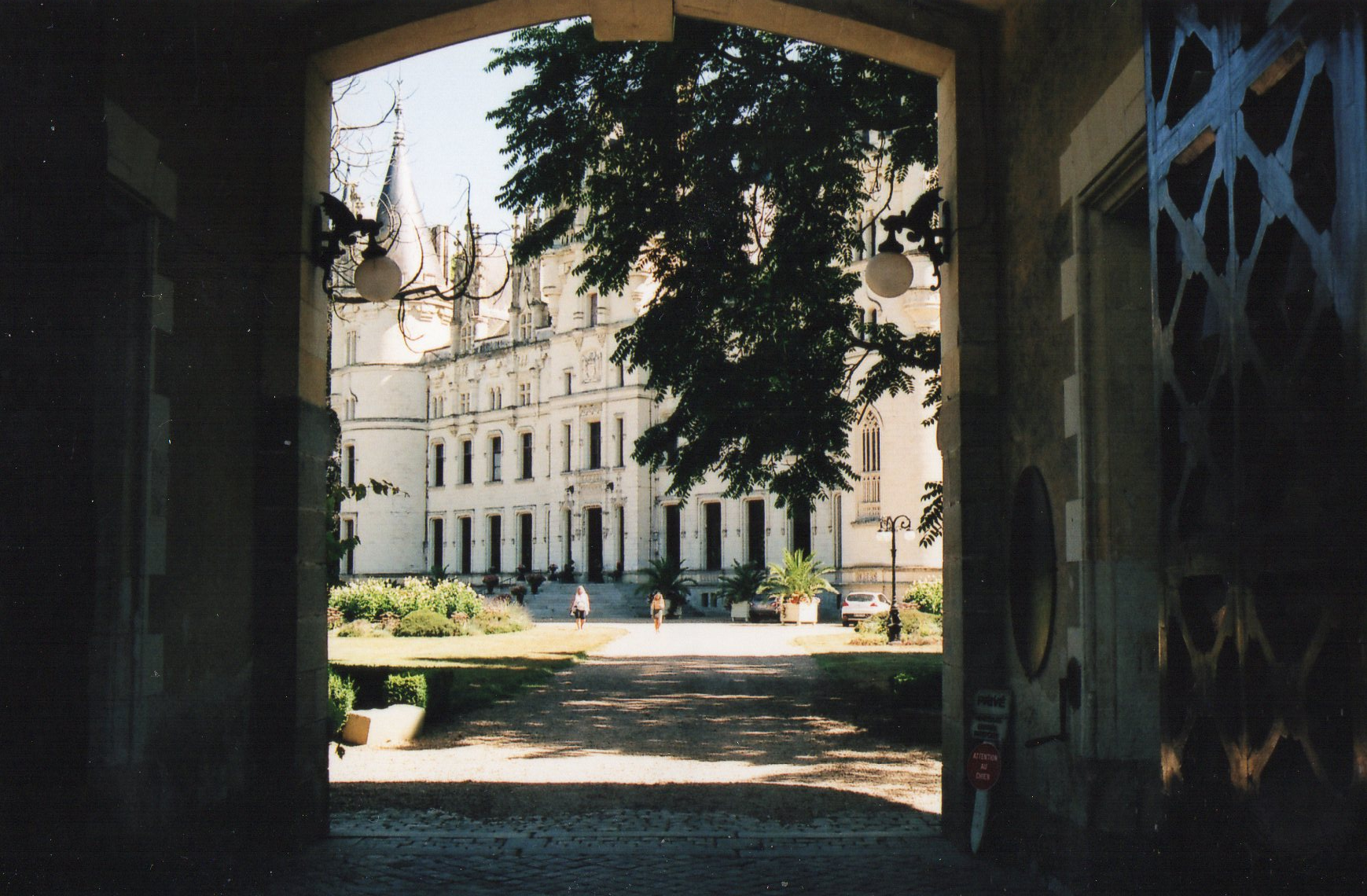 Château de Challain, Maine-et-Loire, France.